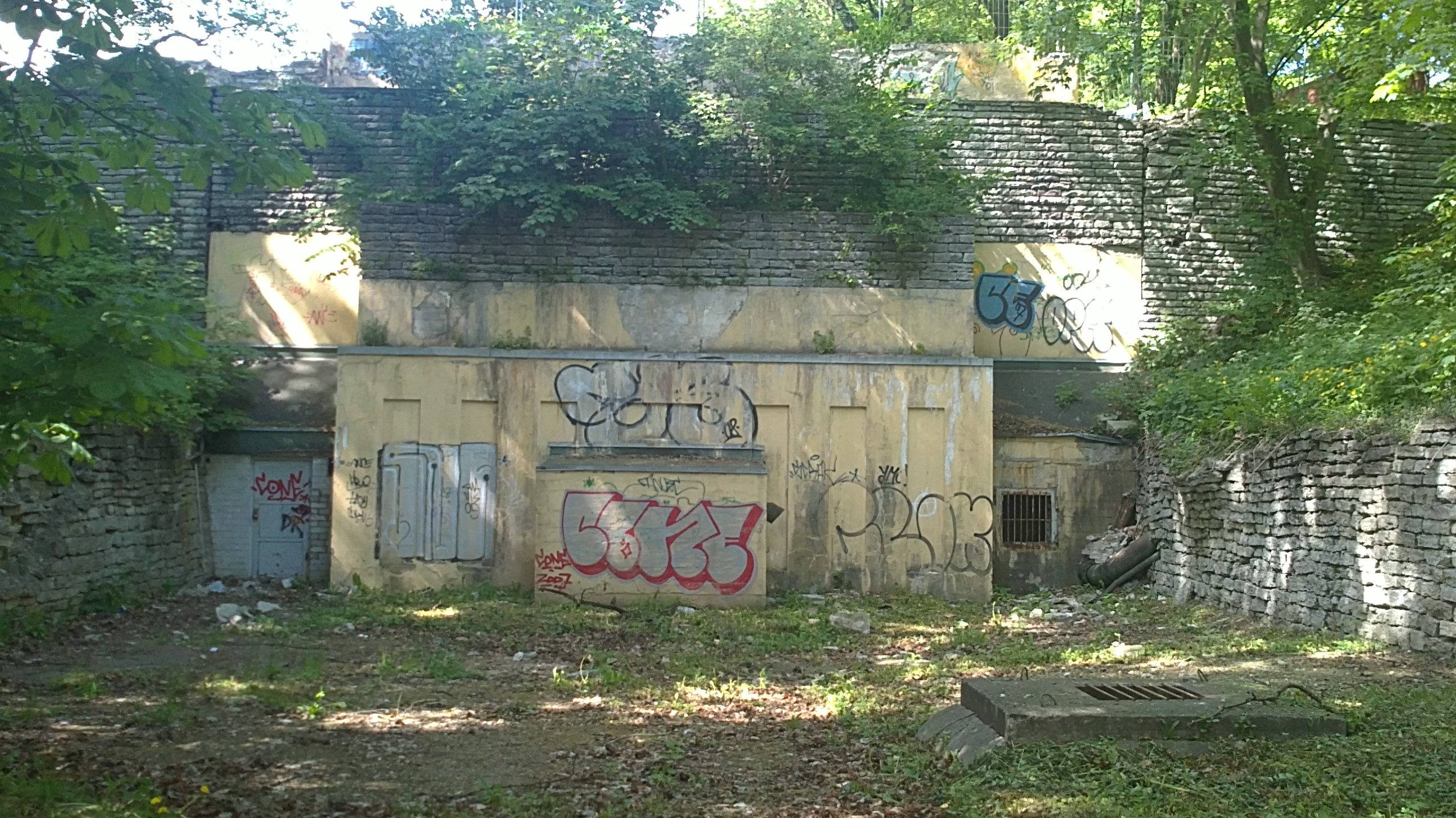 ENSV Tsiviilkaitse Staabi sissepääs Tallinnas Rannamäe teel, Skoone bastioni all